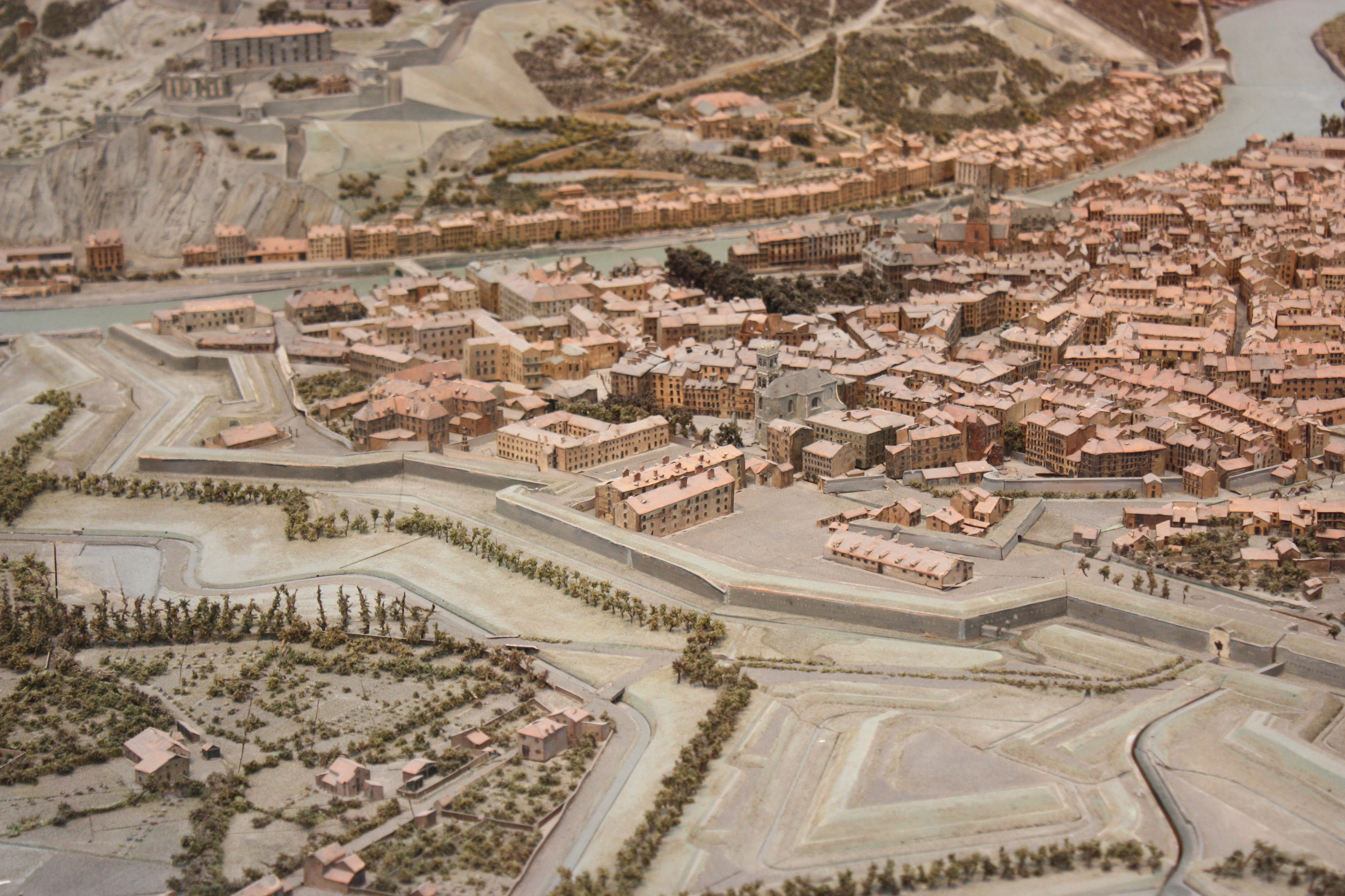 Plan-relief de Grenoble achevé en 1848. Exposition CNAC Grenoble.